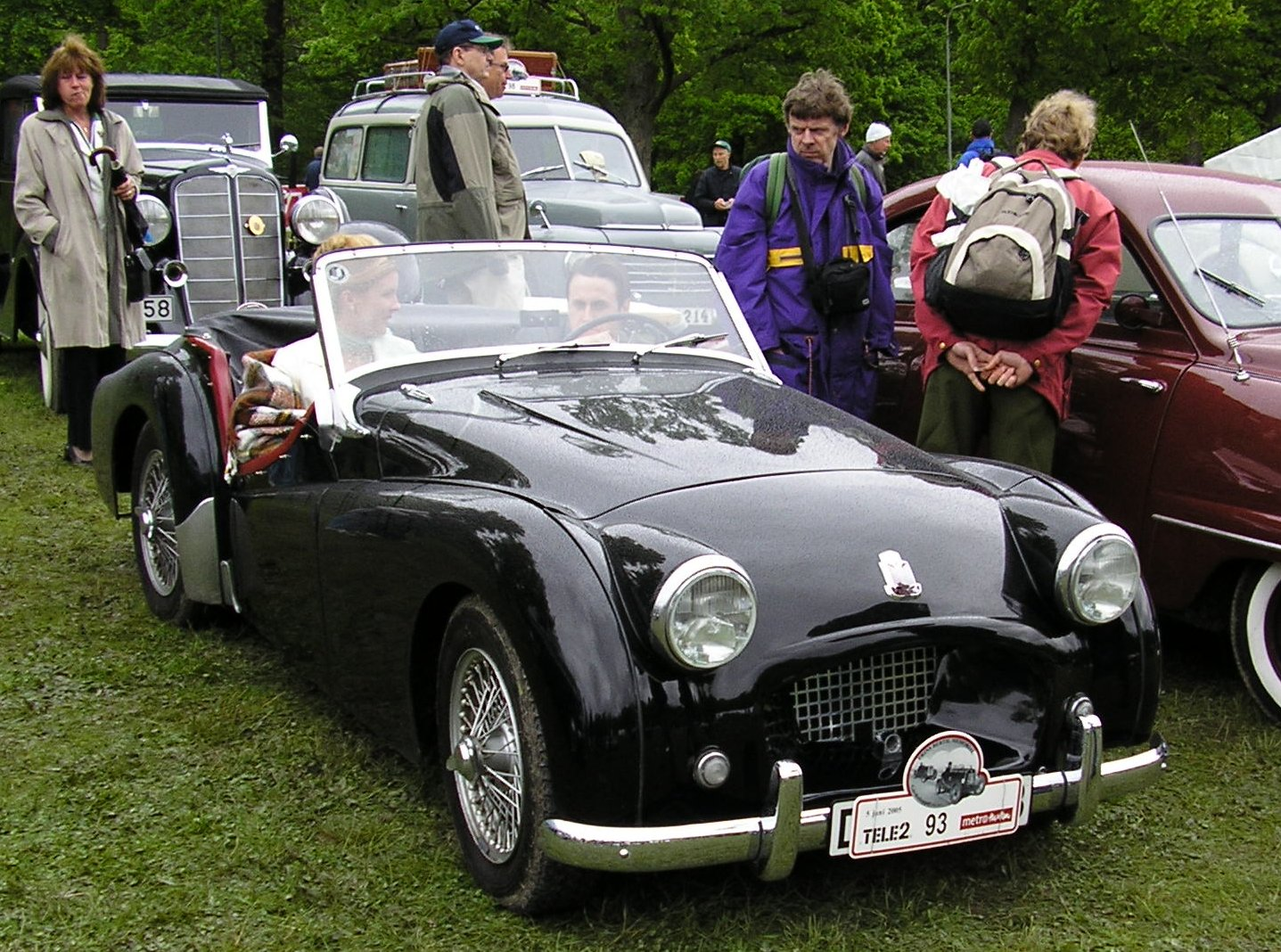 A 1954 Triumph TR2.